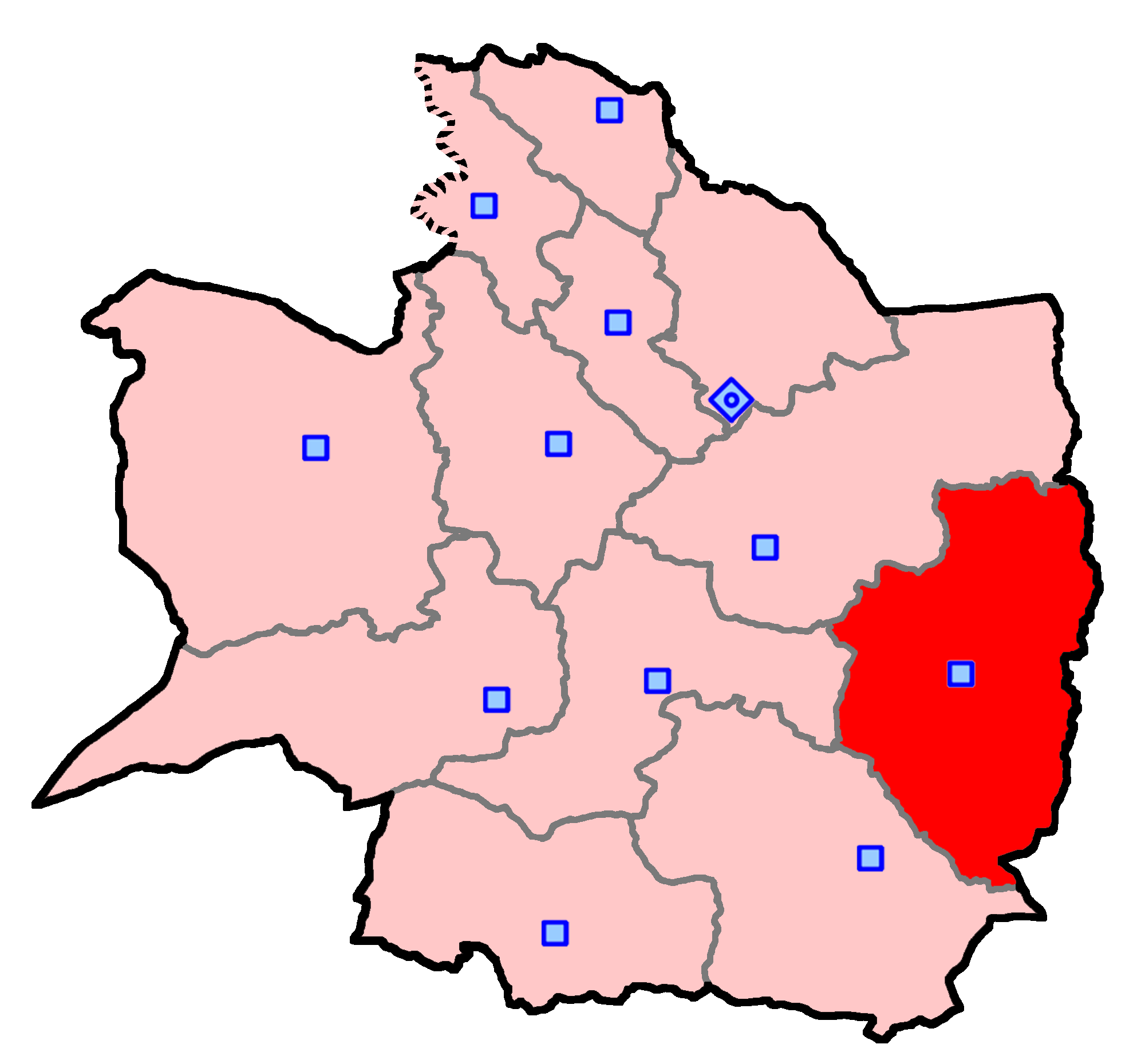 حوزهٔ انتخاباتی تربت جام برای انتخابات مجلس شورای اسلامی